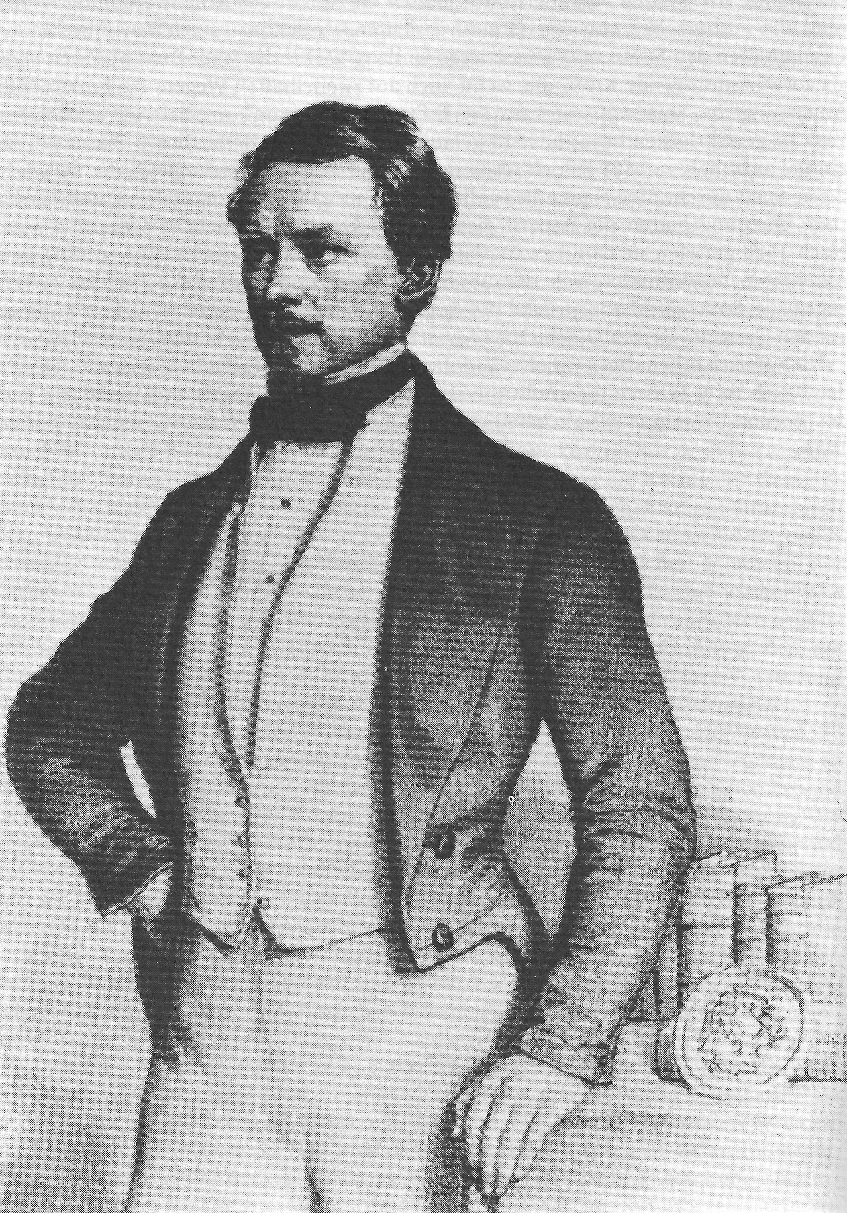 Moritz von Stürler (1807–1882), bernischer Staatsschreiber und Staatsarchivar.